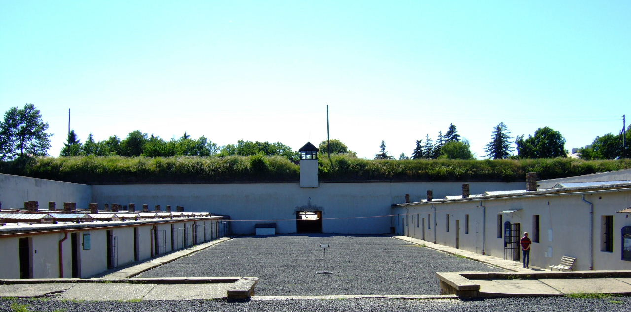 Hof IV der Kleinen Festung in Theresienstadt Aufnahme: 1. Juli 2006 Url